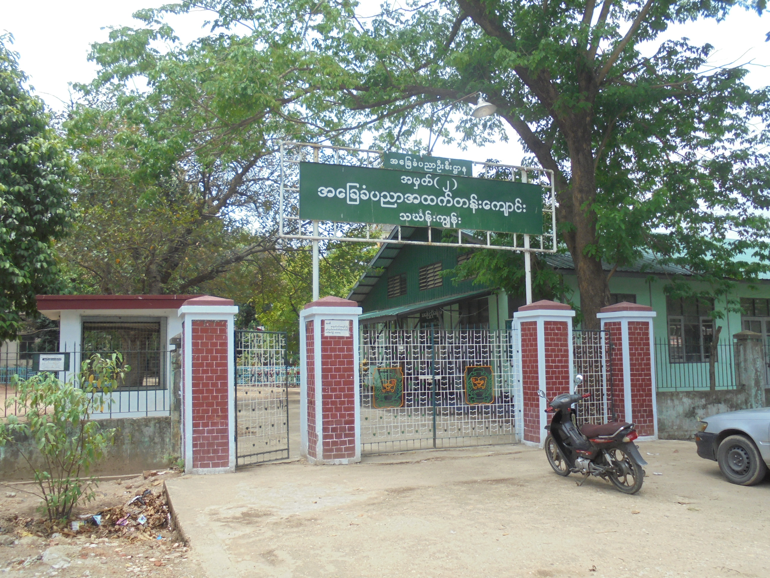 မြန်မာဘာသာ: အ.ထ.က(၂)သင်္ကန်းကျွန်း